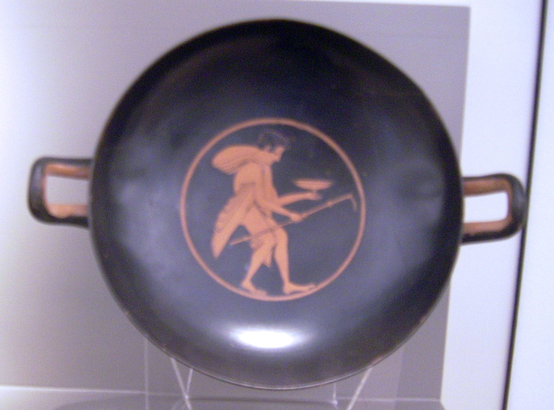 Ein eine Schale tragender Jüngling, attisch-rotfigurige Trinkschale (Kylix), gefunden in Korinth, um 510 v. Chr., mit der Lieblingsinschrift (Kalos-Name), Antikensammlung Berlin/Altes Museum